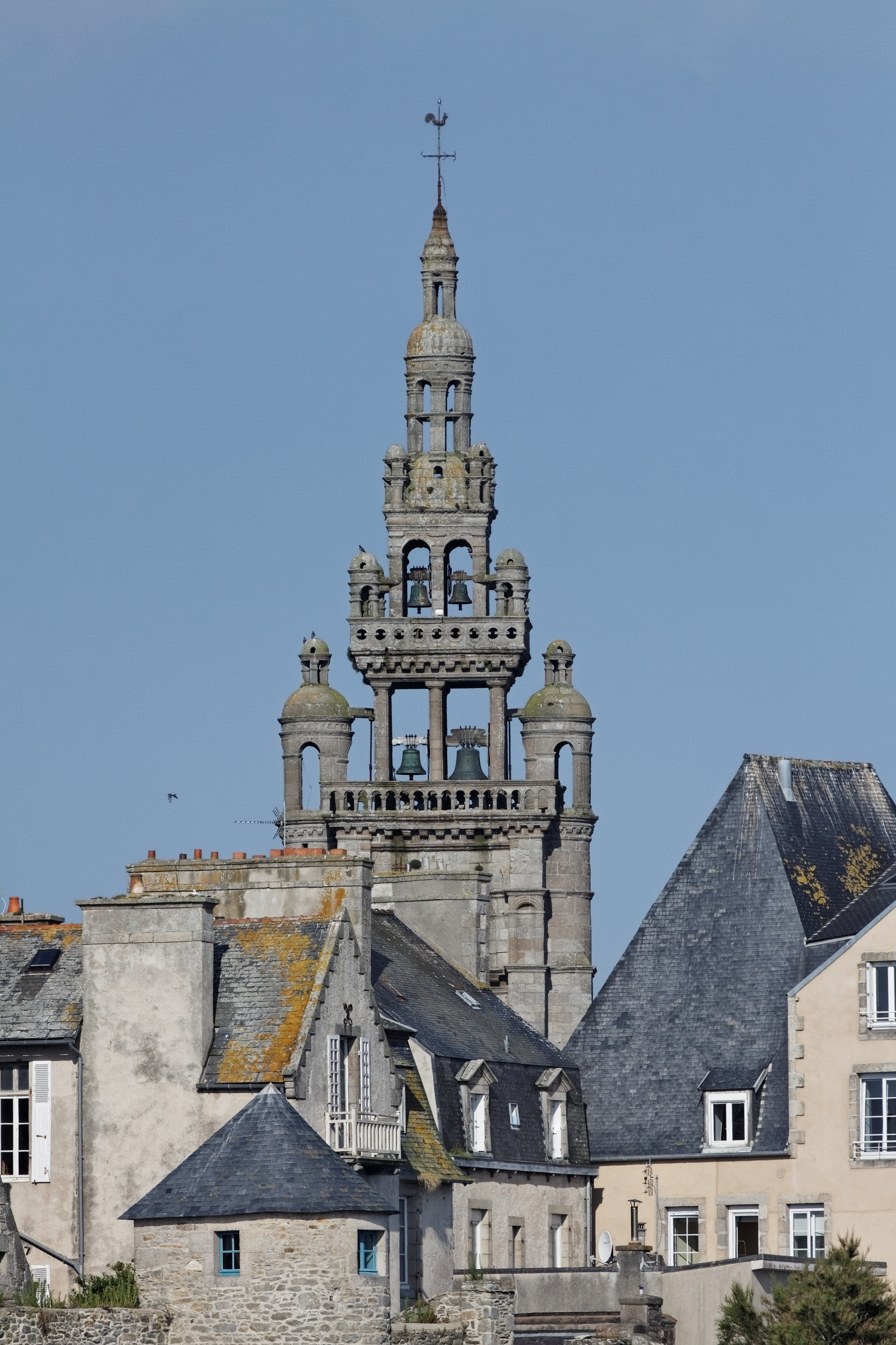 Vue du clocher de l'église Notre-Dame de Croaz-Batz à Roscoff.